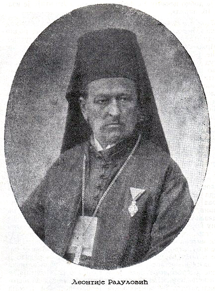 Leontije Radulović, bishop of Mostar, metropolitan of Hercegovina and Zahumlje